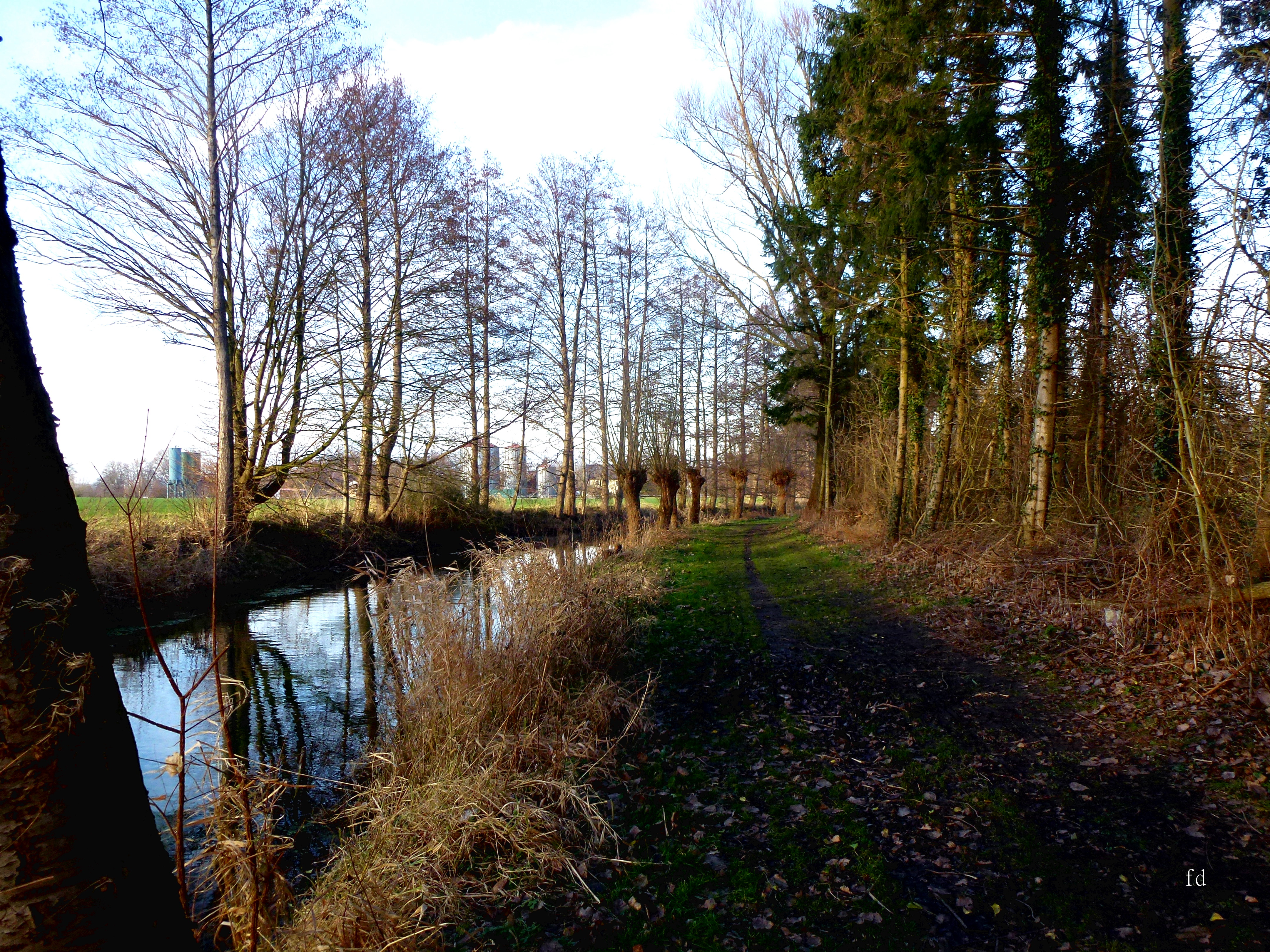 Die Rosenau mit Kopfweiden in der Nähe von Bad Sassendorf; Naturschutzgebiet „Rosenaue“ (NSG SO-080)